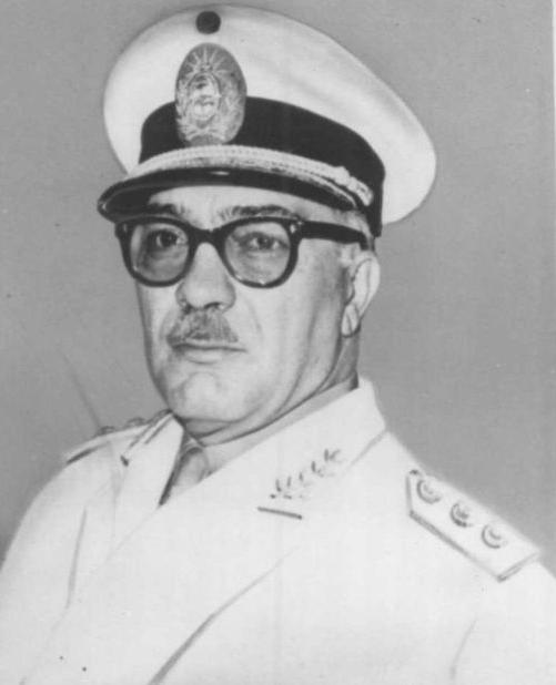 Teniente General Raúl Poggi.